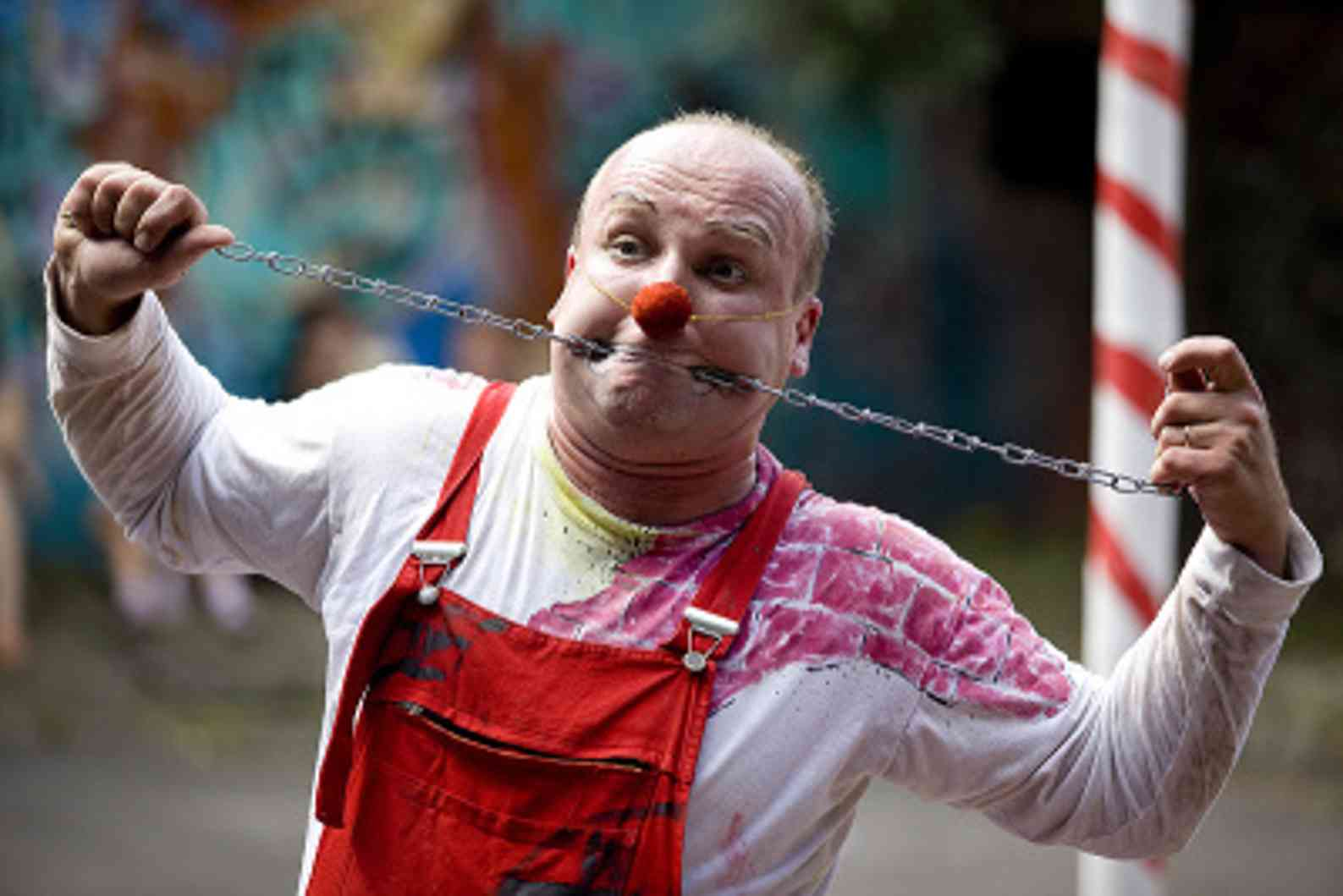 Clown Števo Capko ve svém představení Brick circk, foto z účinkování na Letní Letné